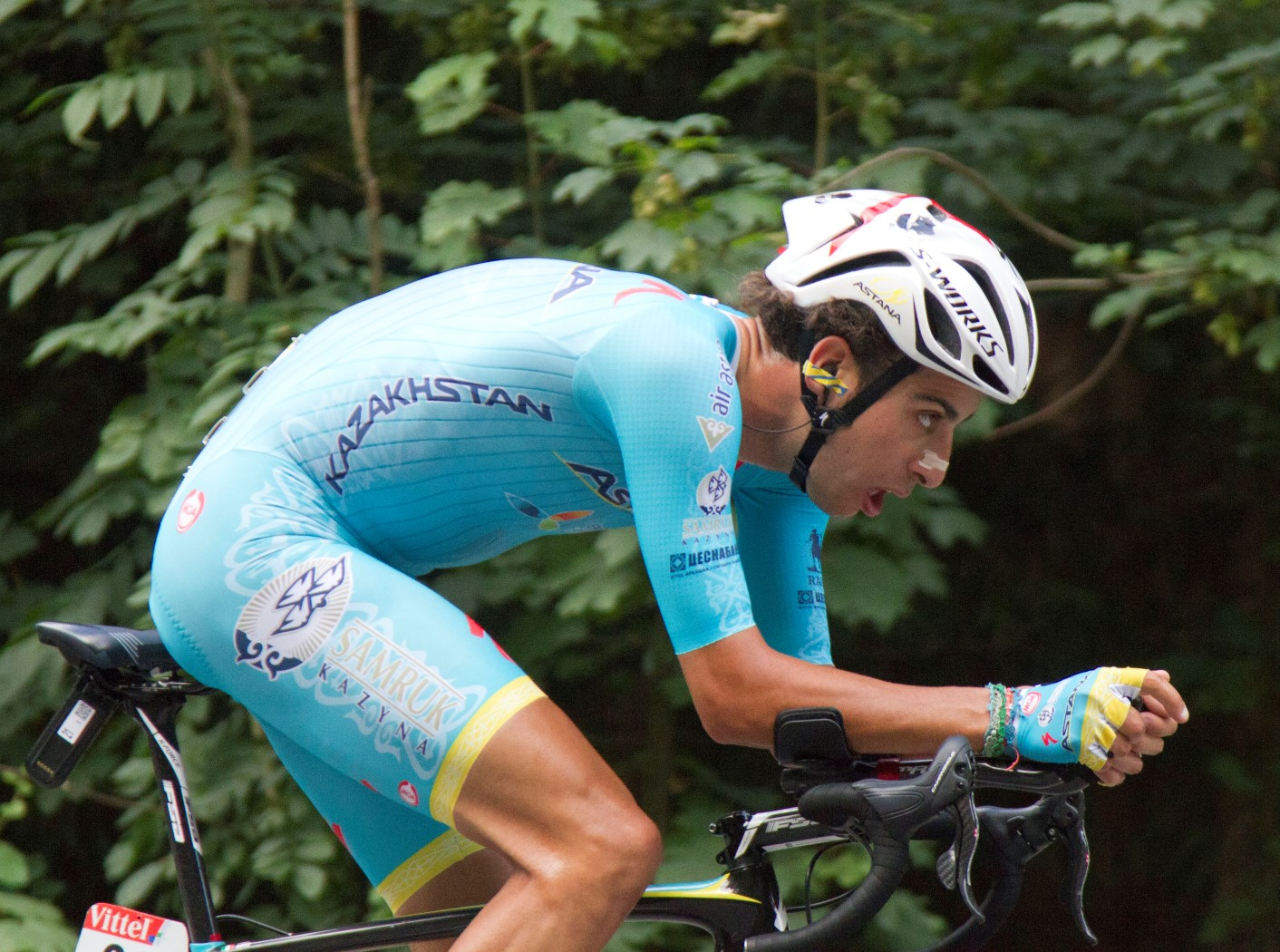 461 aru